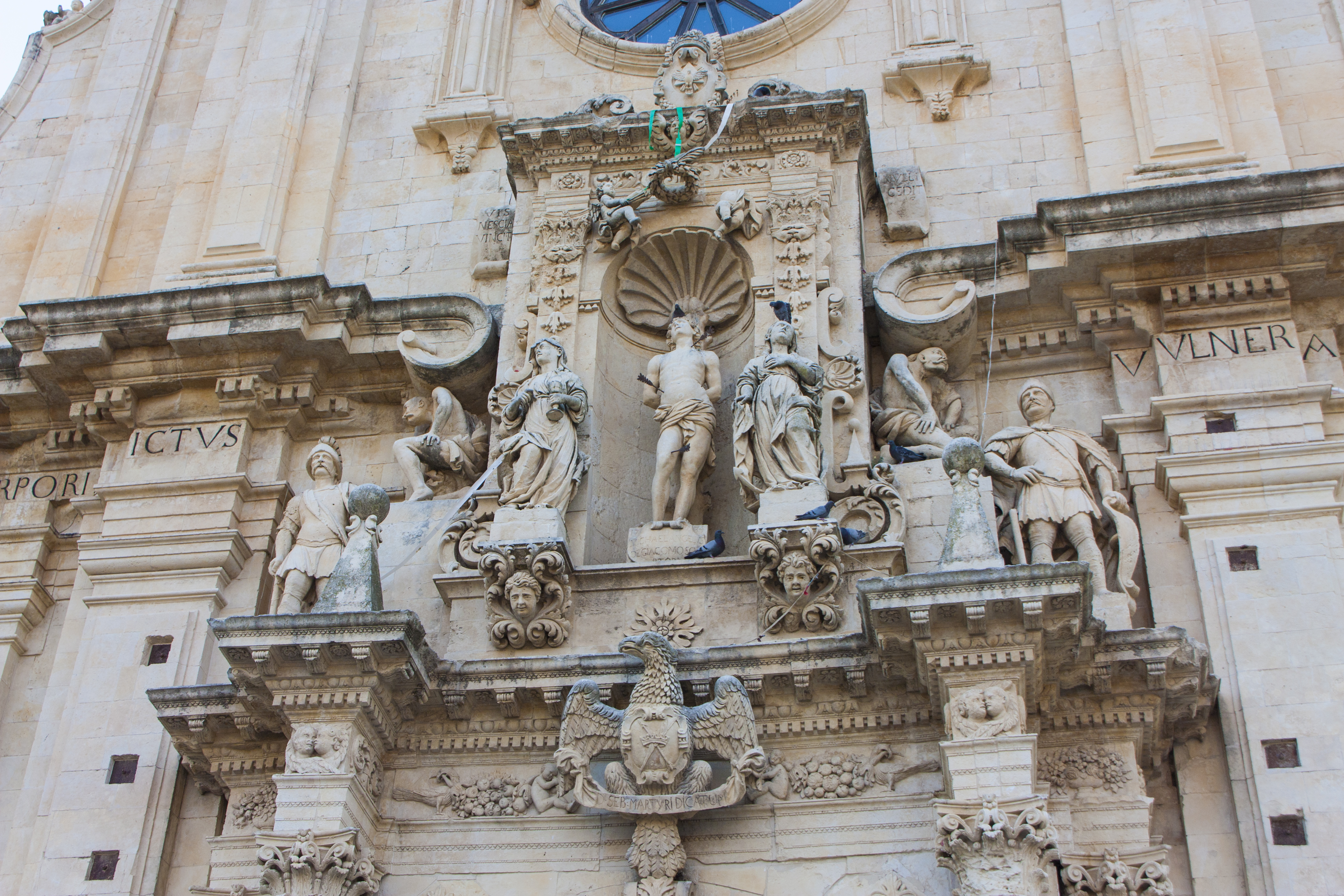 dettaglio della facciata